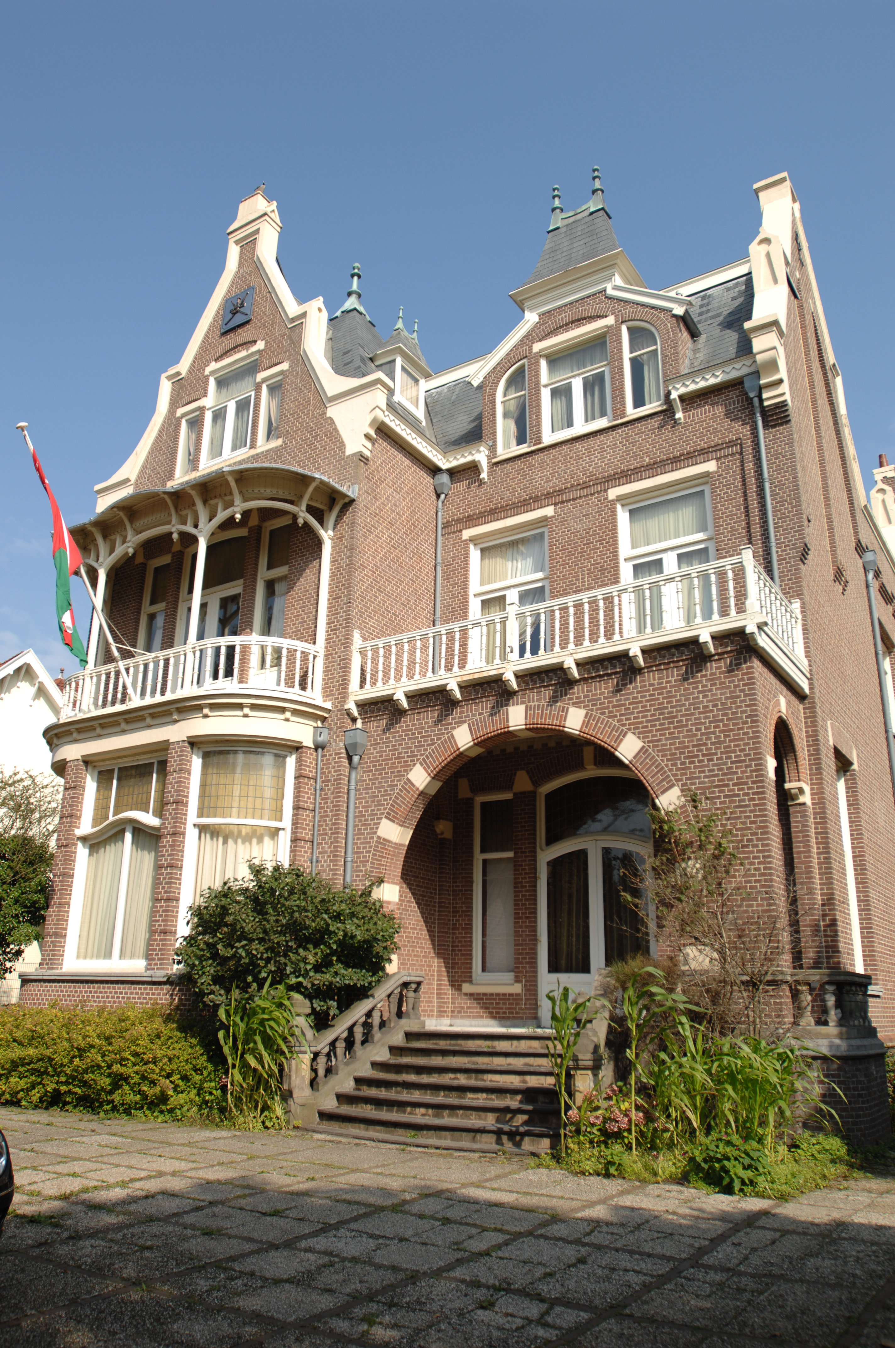 Vrijstaande villa uit ca. 1900 aan de Nieuwe Parklaan 9 te Den Haag. Thans in gebruik als ambassade van Oman.